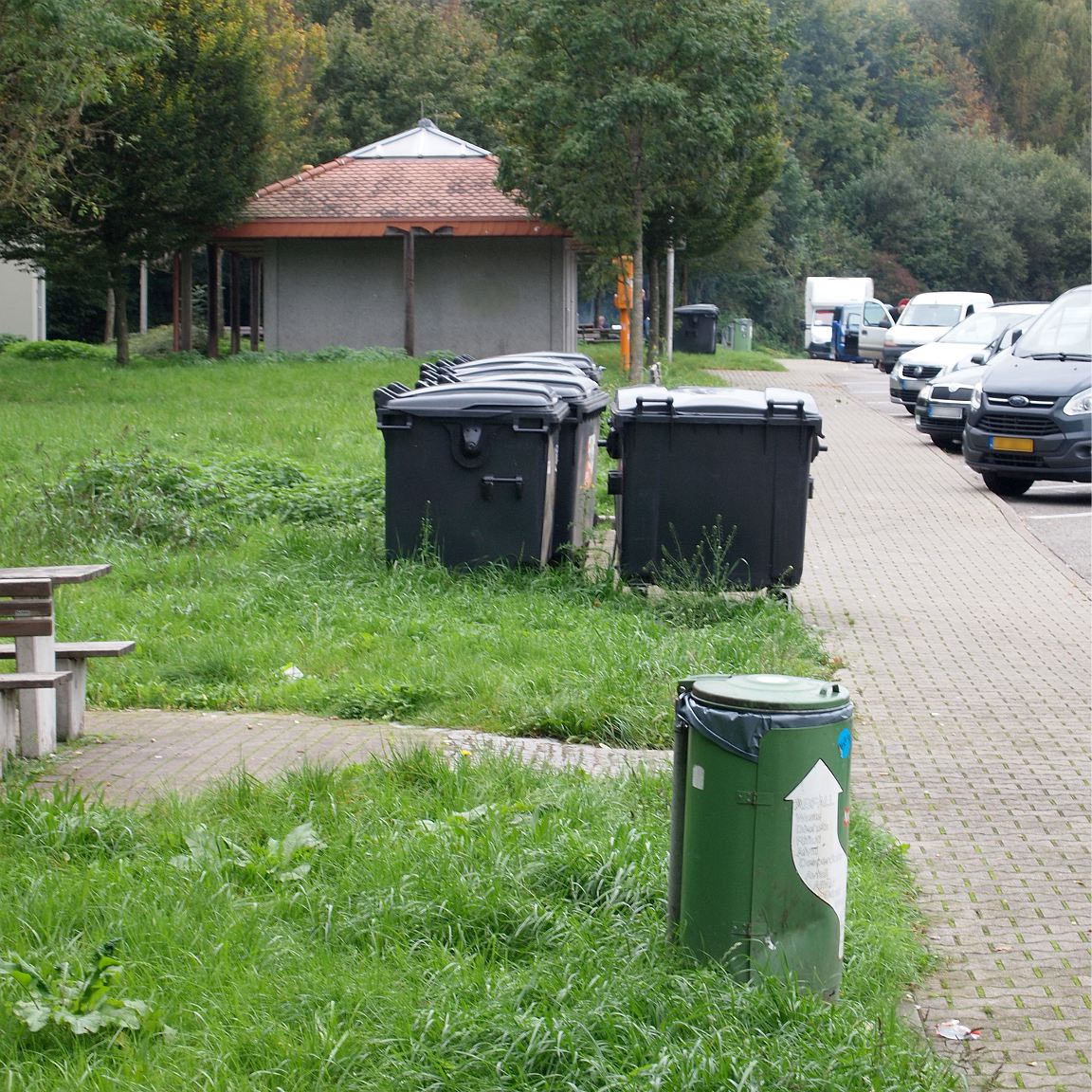 Müllbehälter am Autobahnparkplatz Steinig